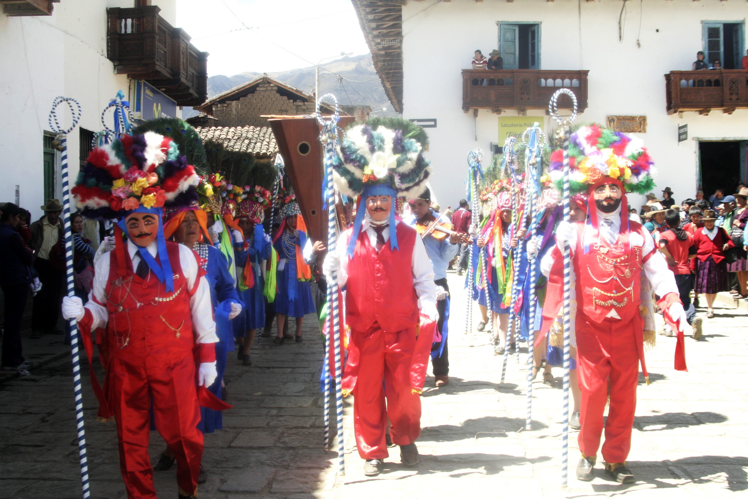 Danza Anti Runas